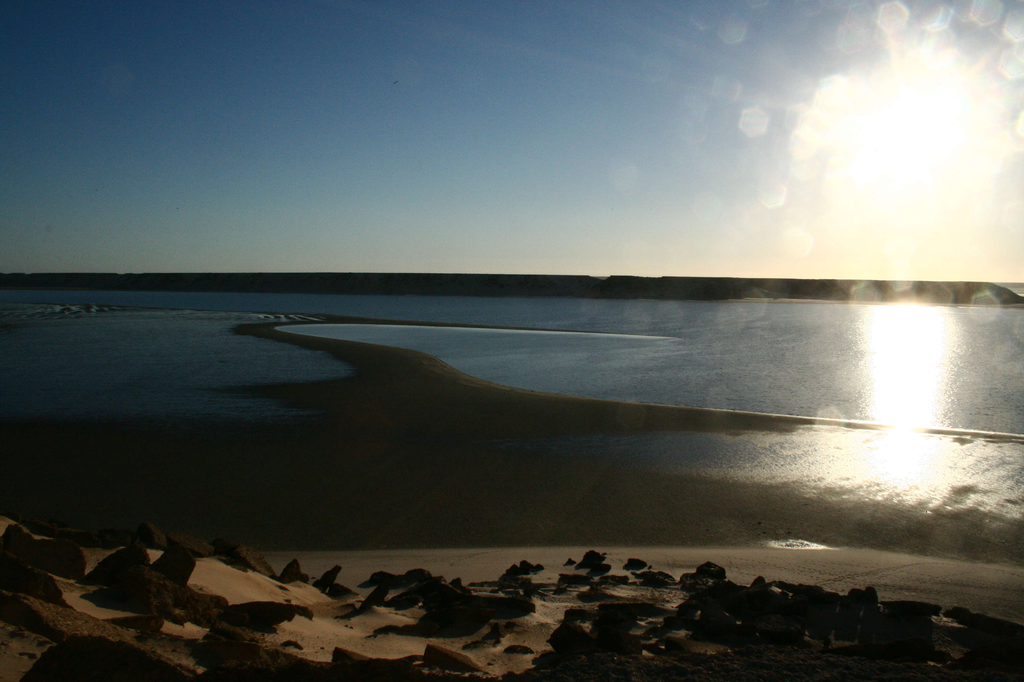 Paesaggio vicino a Dakhla